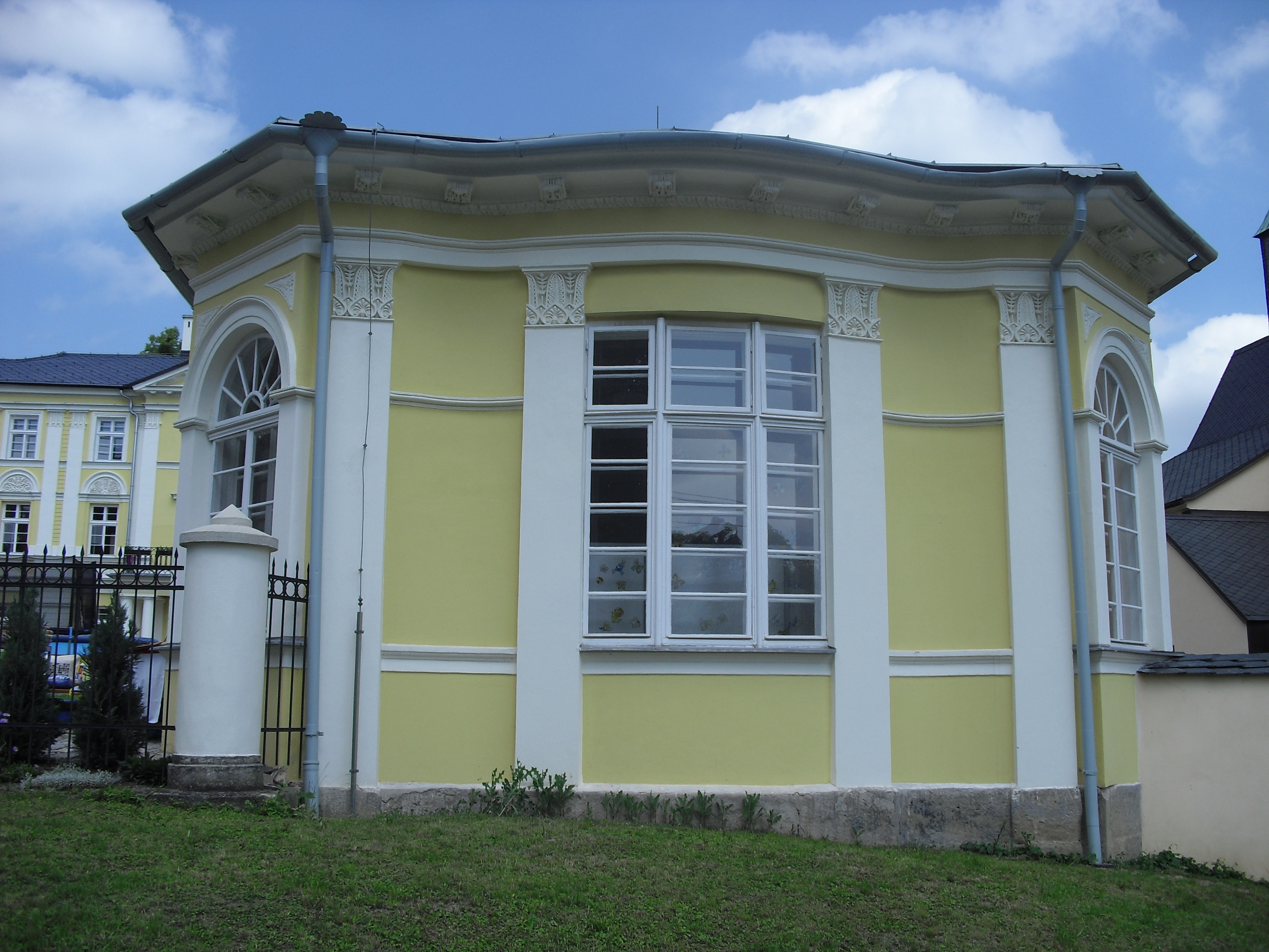 Fulnek, okres Nový Jičín, Česká republika. Kapucínská 281, Vila Loreta. Empírová vila, dnes domov mládeže.